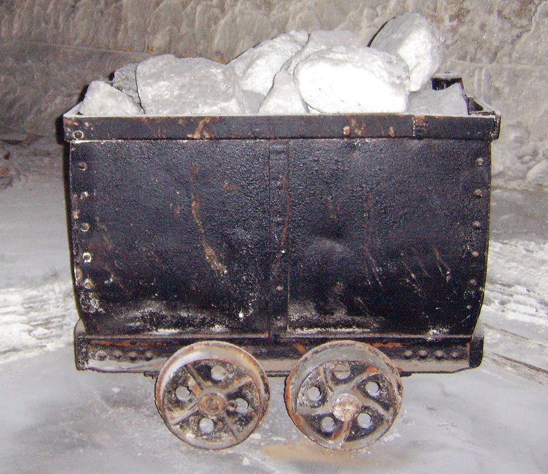 Förderwagen für die traditionelle Lok-Förderung unter Tage. (hier: Anschauungsstück im Steinsalzbergwerk Bernburg. Dieser Förderwagen war in Betrieb gewesen bis zur Umstellung der gesamten Grube auf sogenannte gleislose Förderung).